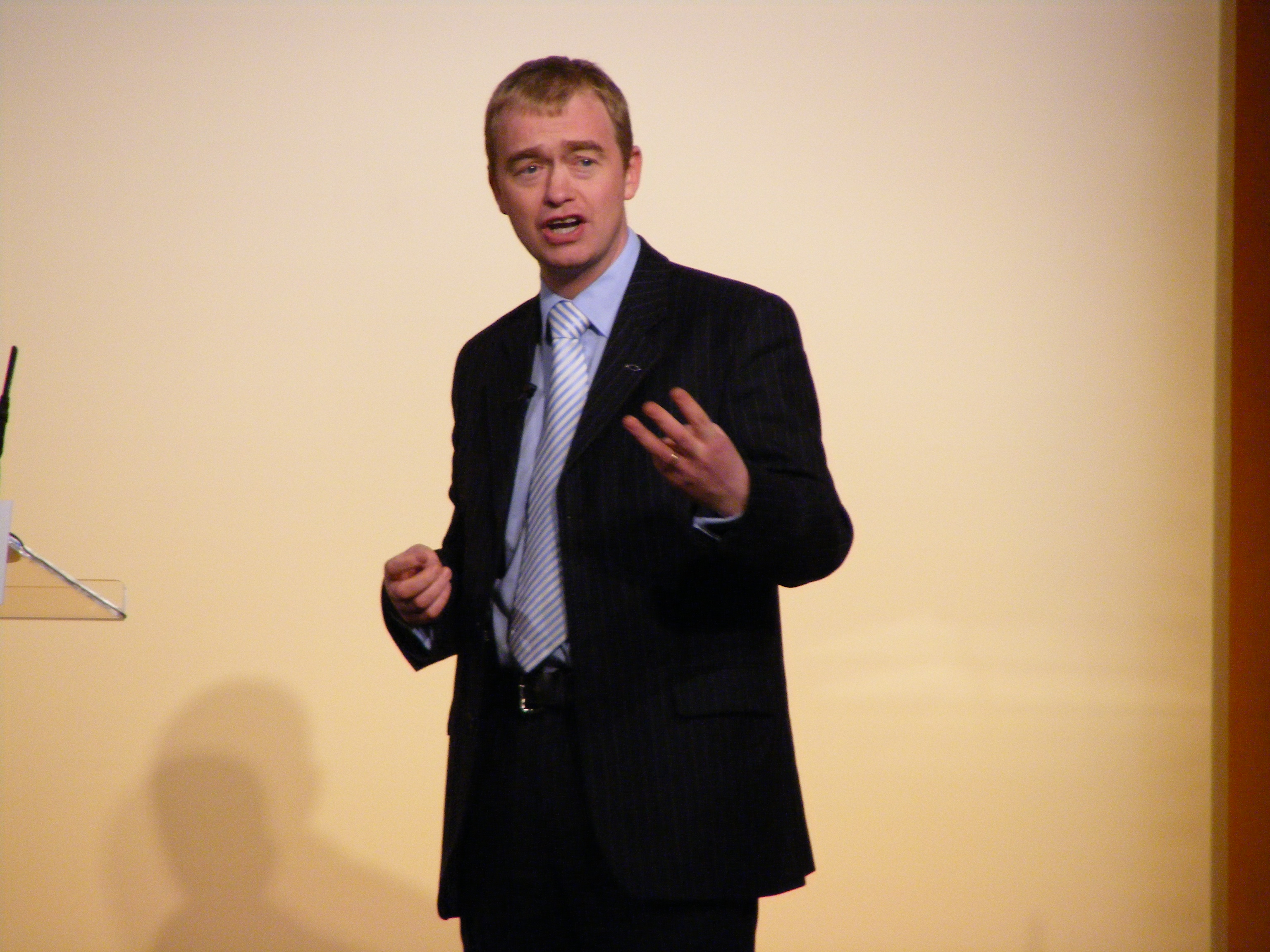 Tim Farron MP